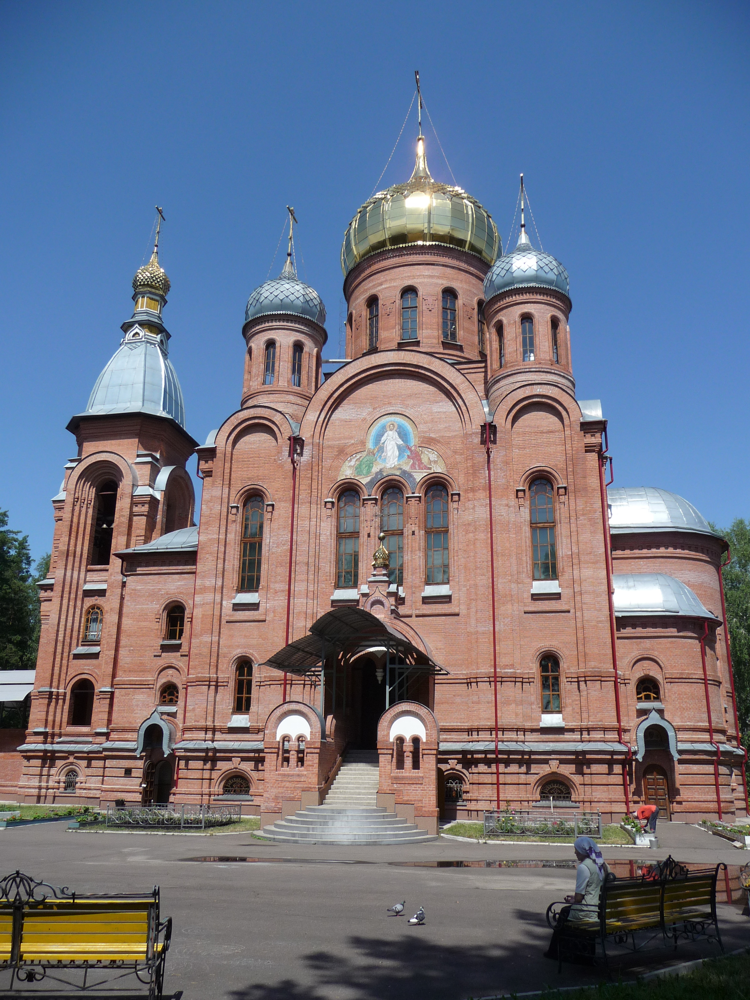 Archangel Michael temple, Zheleznogorsk, Krasnoyarsk Krai